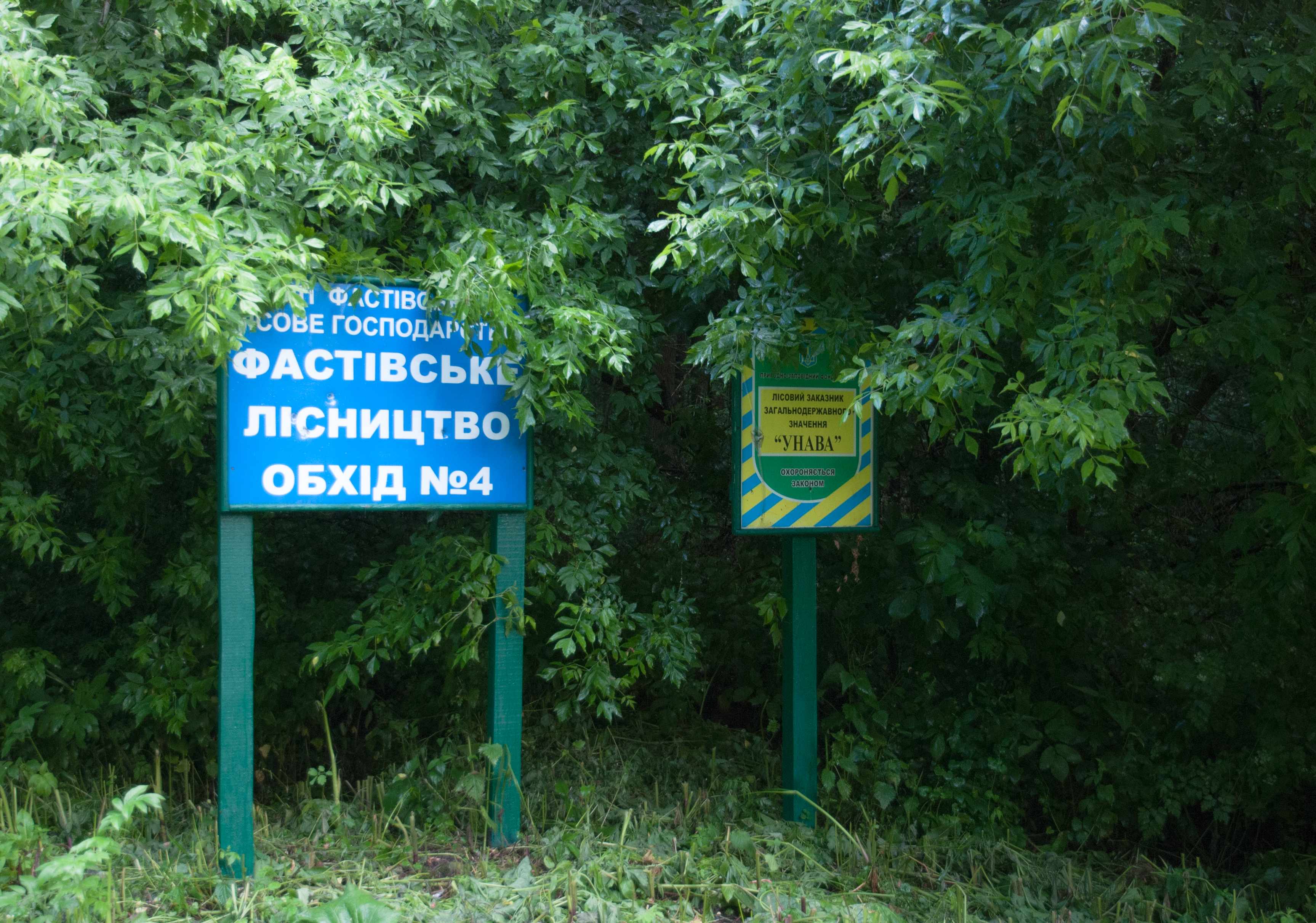 «Урочище Унава», Фастівський район, Волицька сільська рада